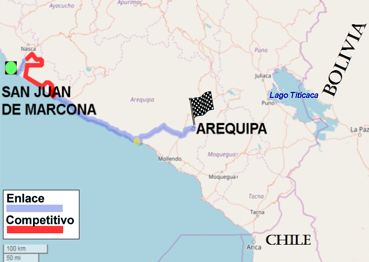 Dakar Rally 2018. Mapa de Etapa 5. Pisco-Pisco. This map of Perú was created from OpenStreetMap project data, collected by the community. This map may be incomplete, and may contain errors. Don't rely solely on it for navigation.